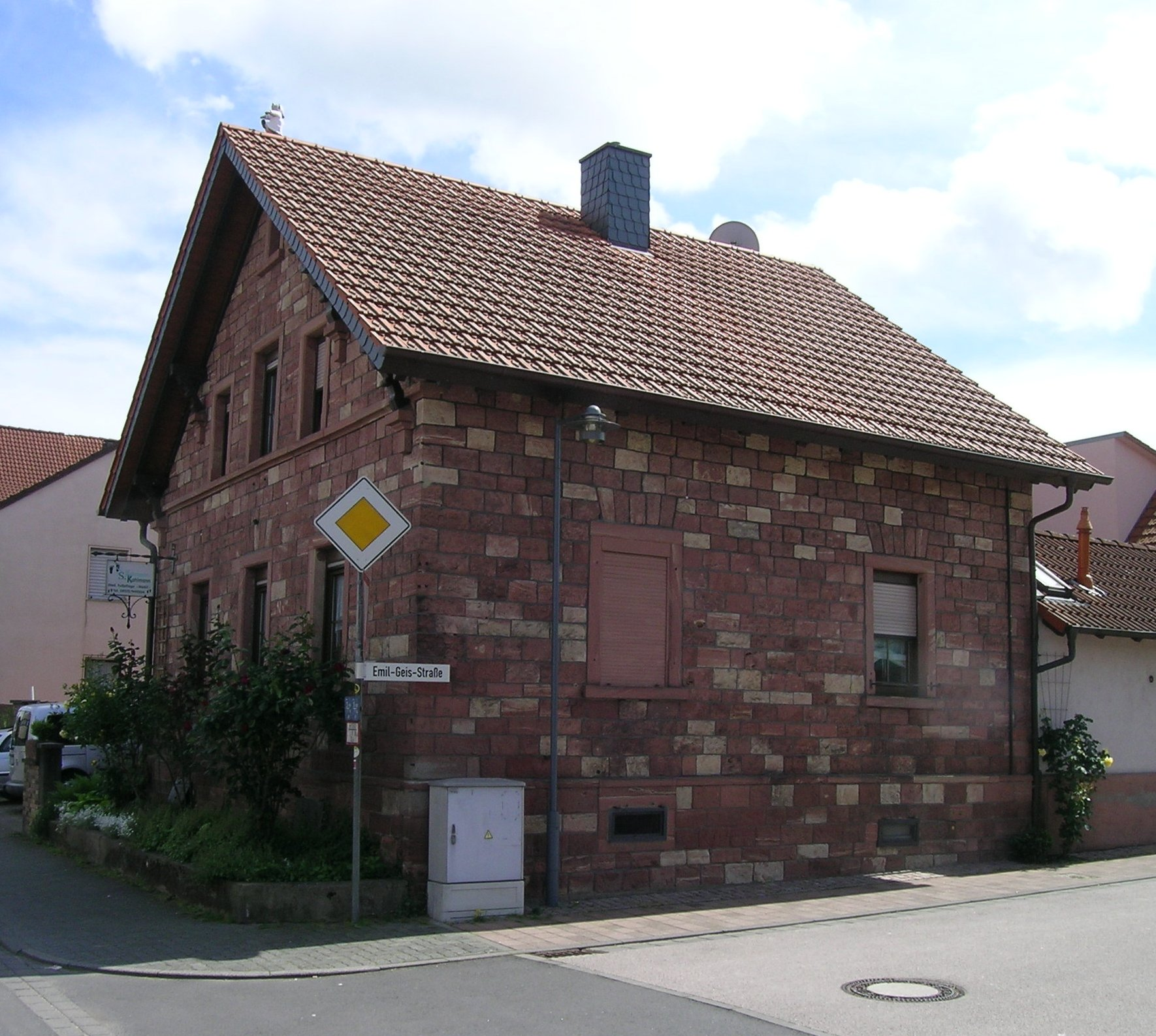 Wohnhaus im nach der Mainüberflutung 1882 angelegten Stadtteils Neu-Wörth (Wörth am Main), D-6-76-169-7